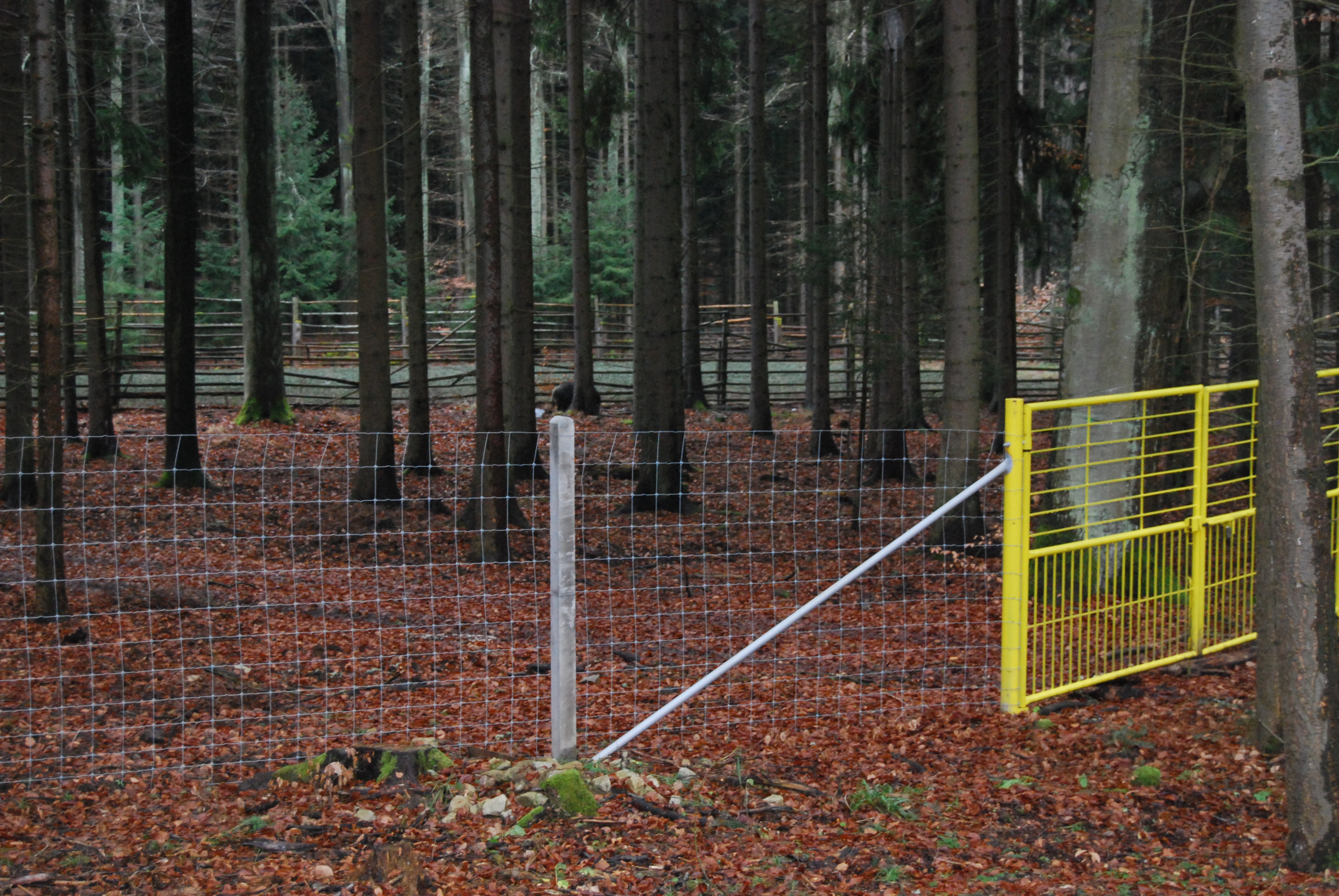 Rukávečská obora, zvaná též Květovská obora. Rukáveč - část města Milevsko v okrese Písek. Česká republika.